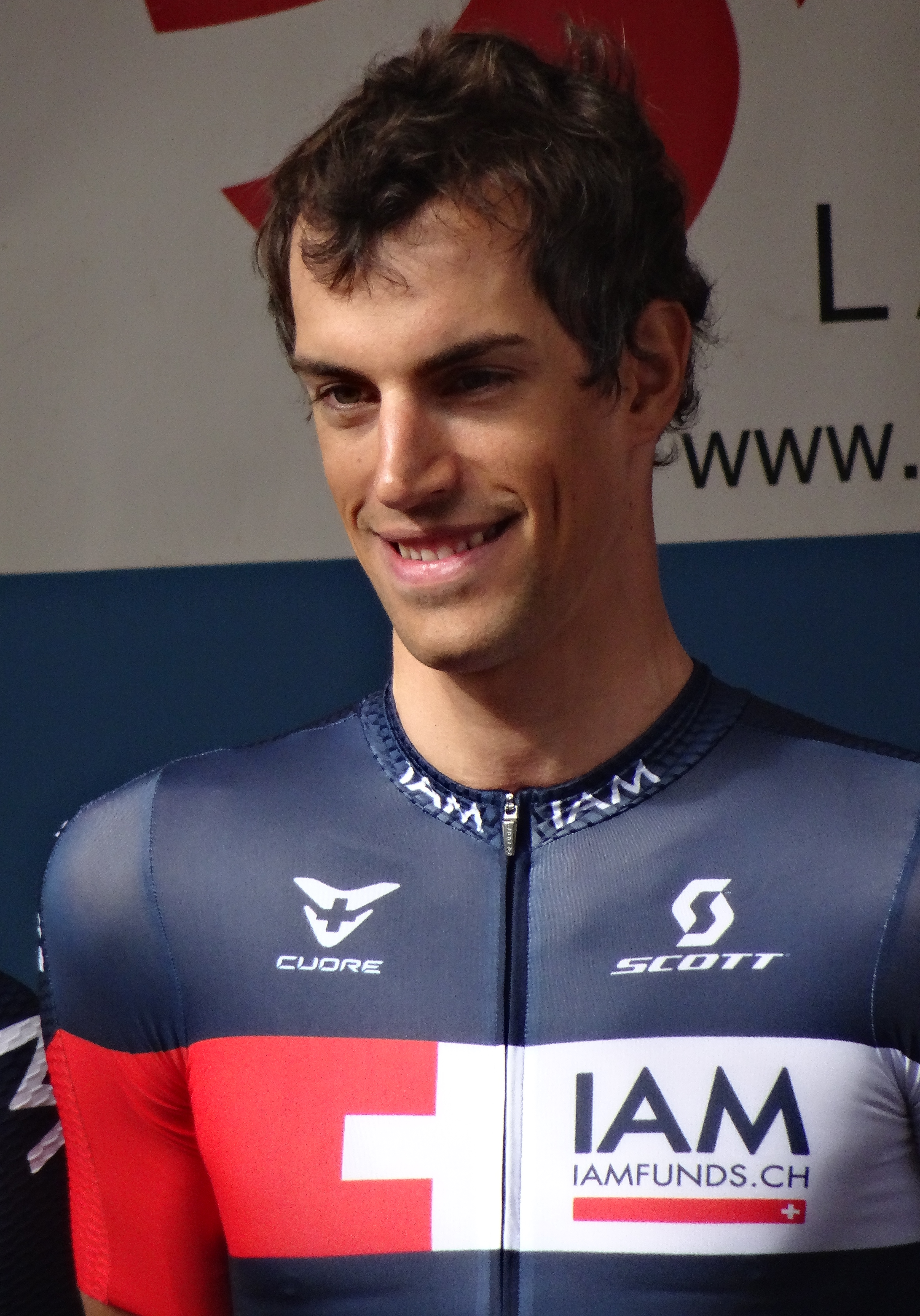 Reportage photographique réalisé le jeudi 2 octobre à l'occasion du départ de la première étape de l'Eurométropole Tour 2014 à La Louvière, Belgique.